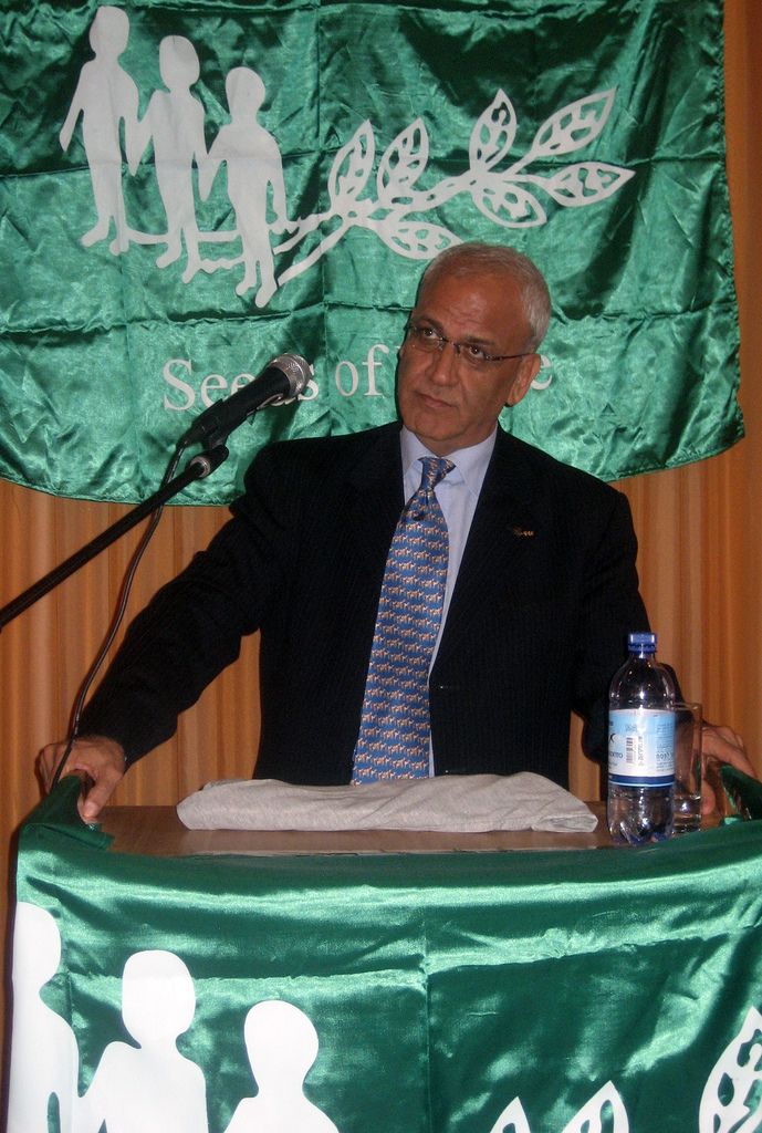 Saeb Ariqat In Negotiation Summit 2007 of Seeds of Peace